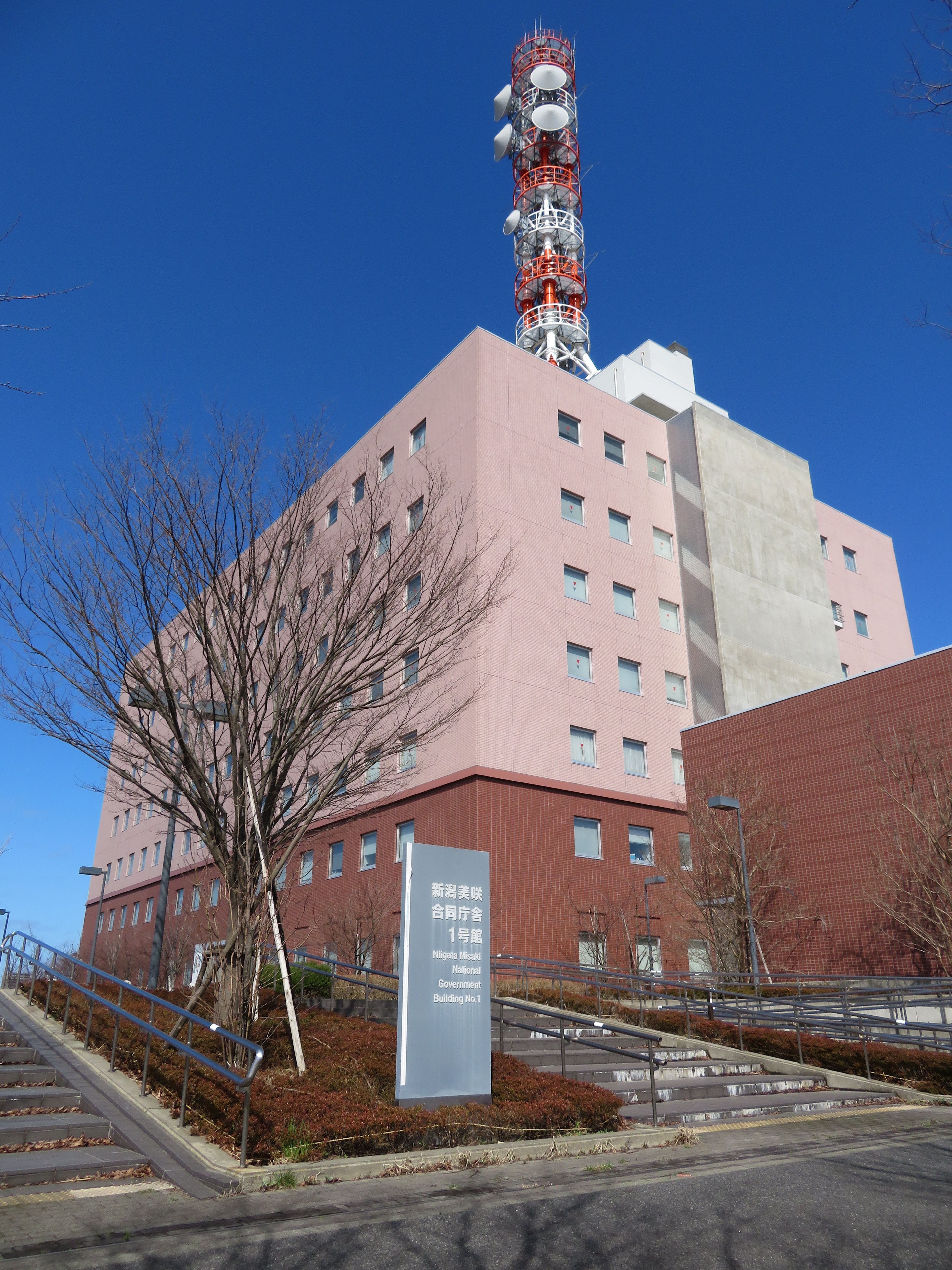 新潟市中央区に所在する新潟美咲合同庁舎1号館